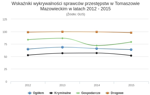 Wykrywalnosc przestepstw w Tomaszowie Mazowieckim 2012-2015